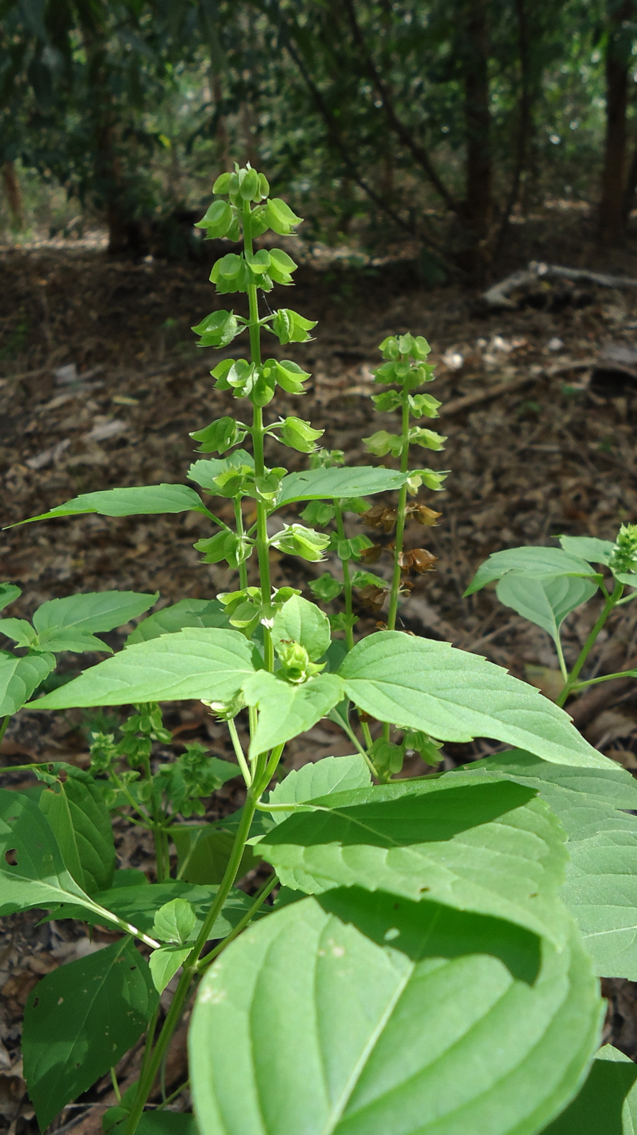 Ocimum campechianum Mill.